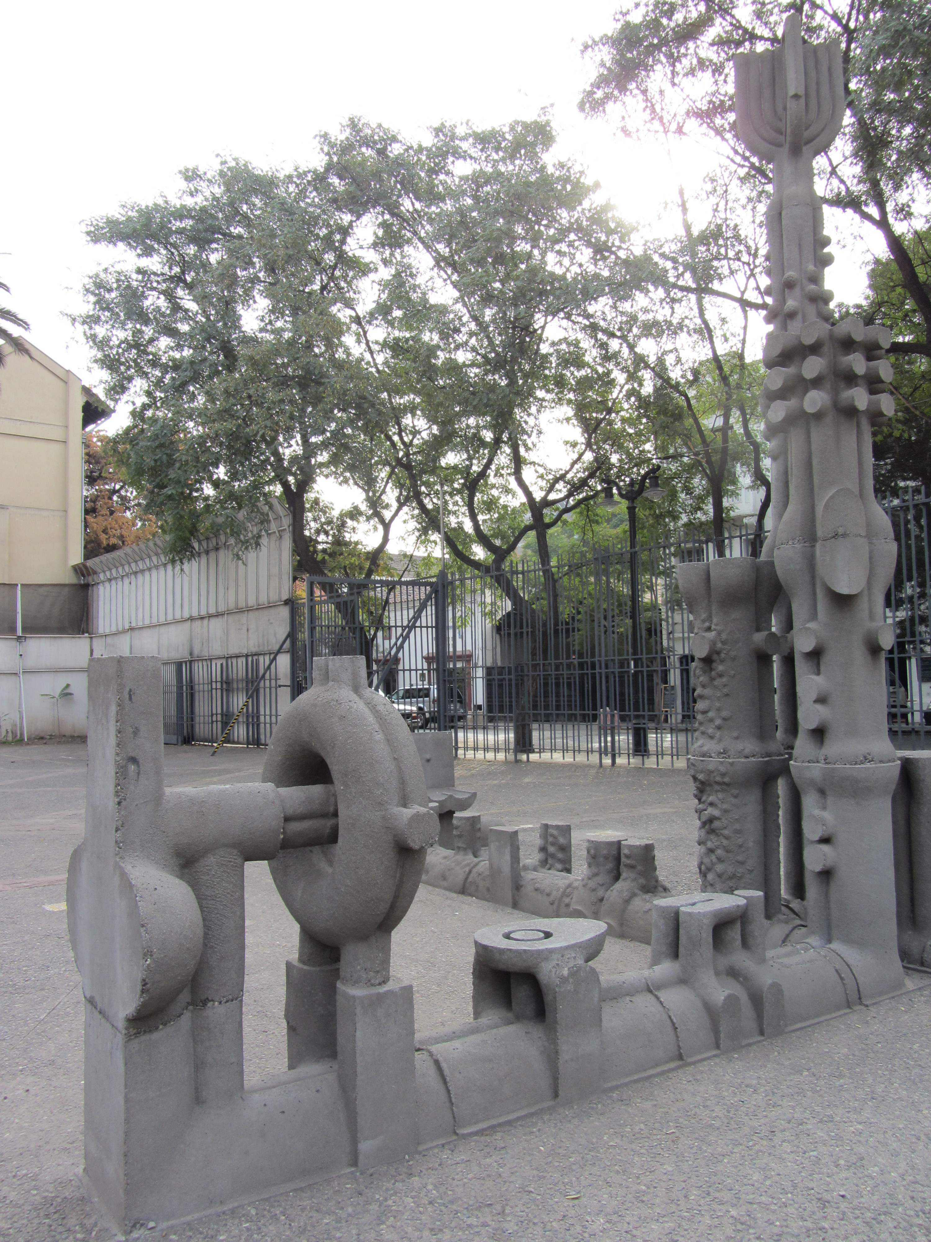 Conjunto en la plaza Federico Assler